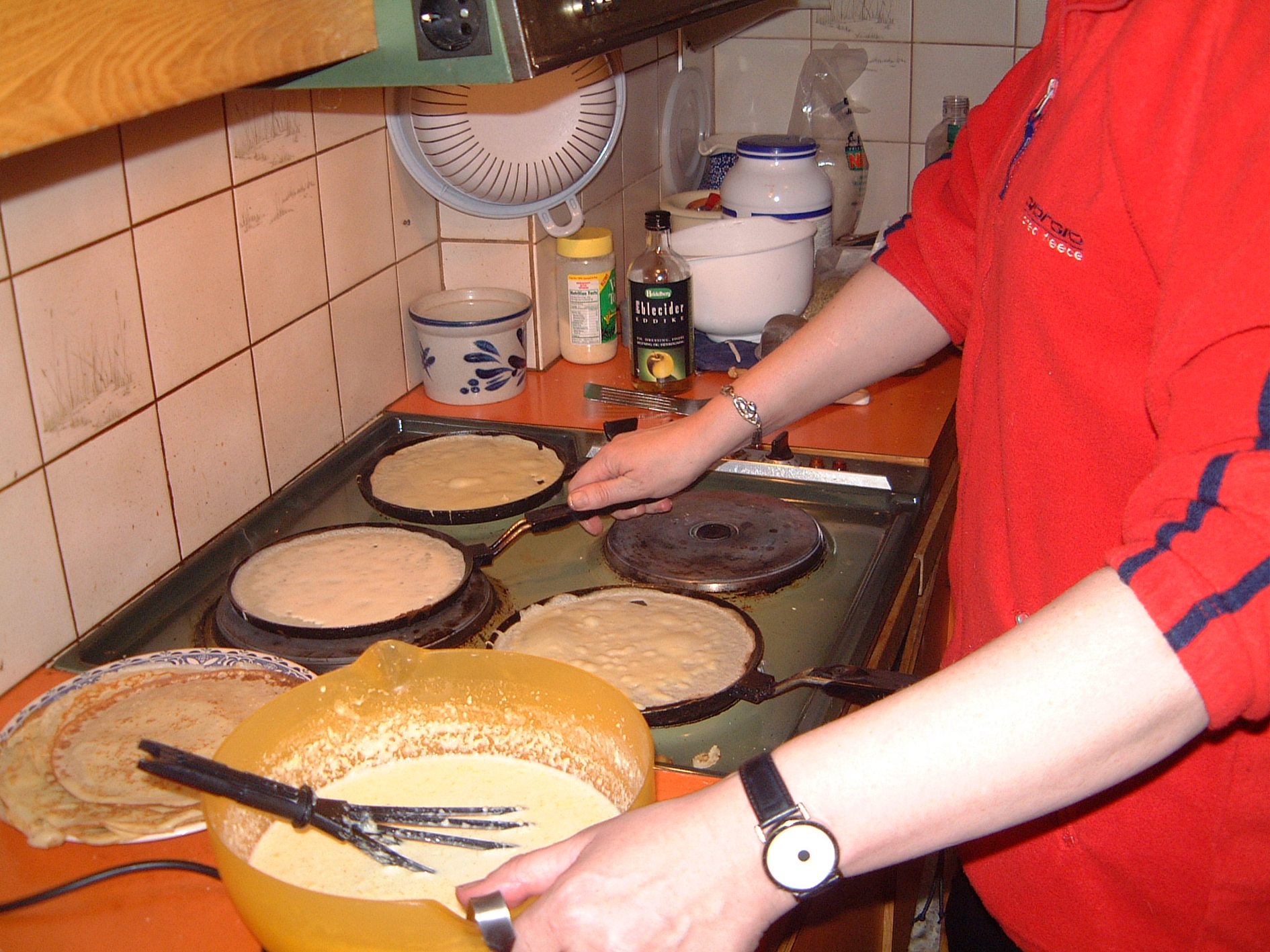 Pönnukökur í bakstri, Hallgerður Gísladóttir bakar á eldavél sinni í Sörlaskjóli 6.